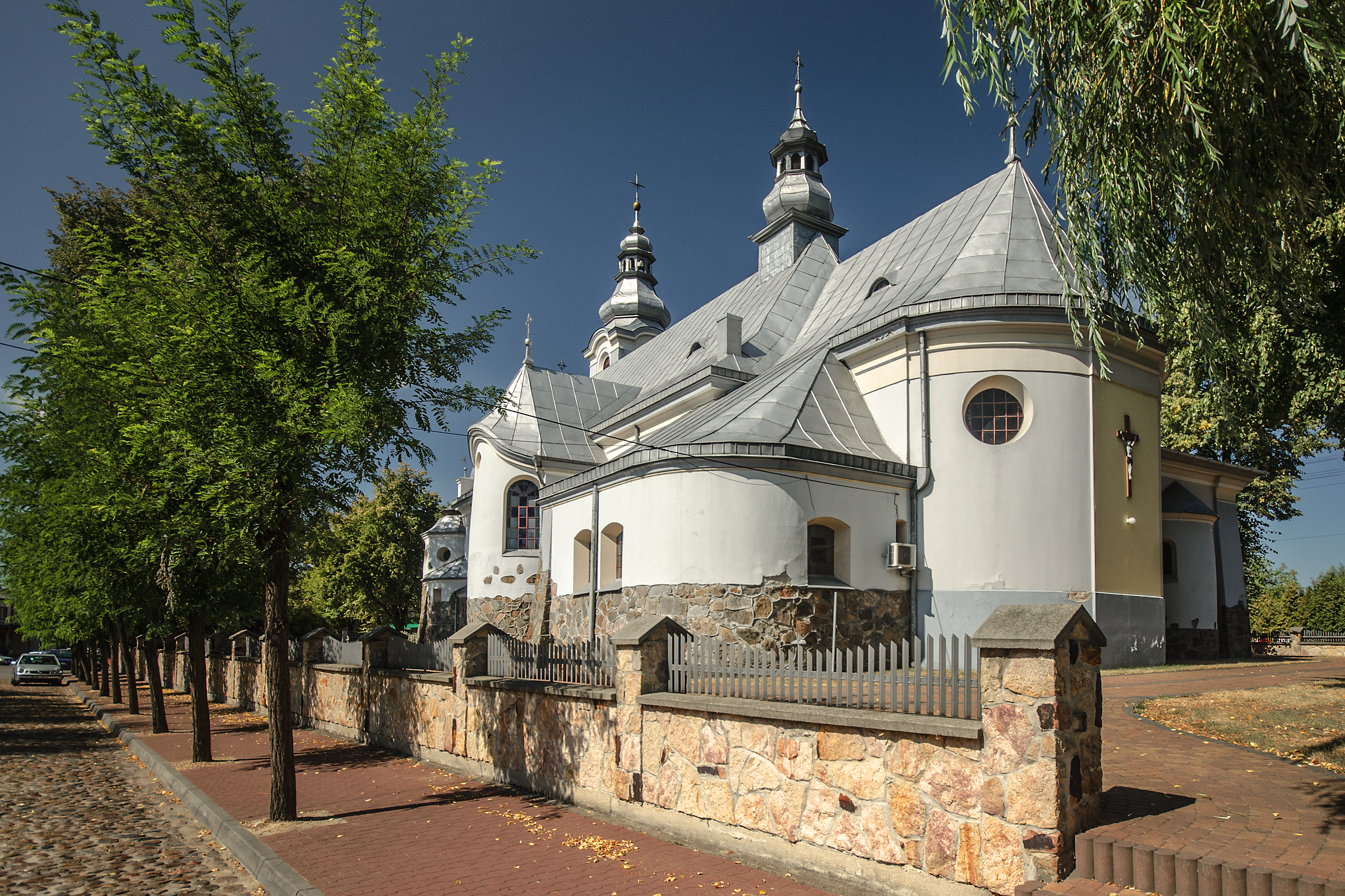 Kościół Narodzenia NMP, Szczerców, gm. Szczerców, pow. bełchatowski, woj. łódzkie